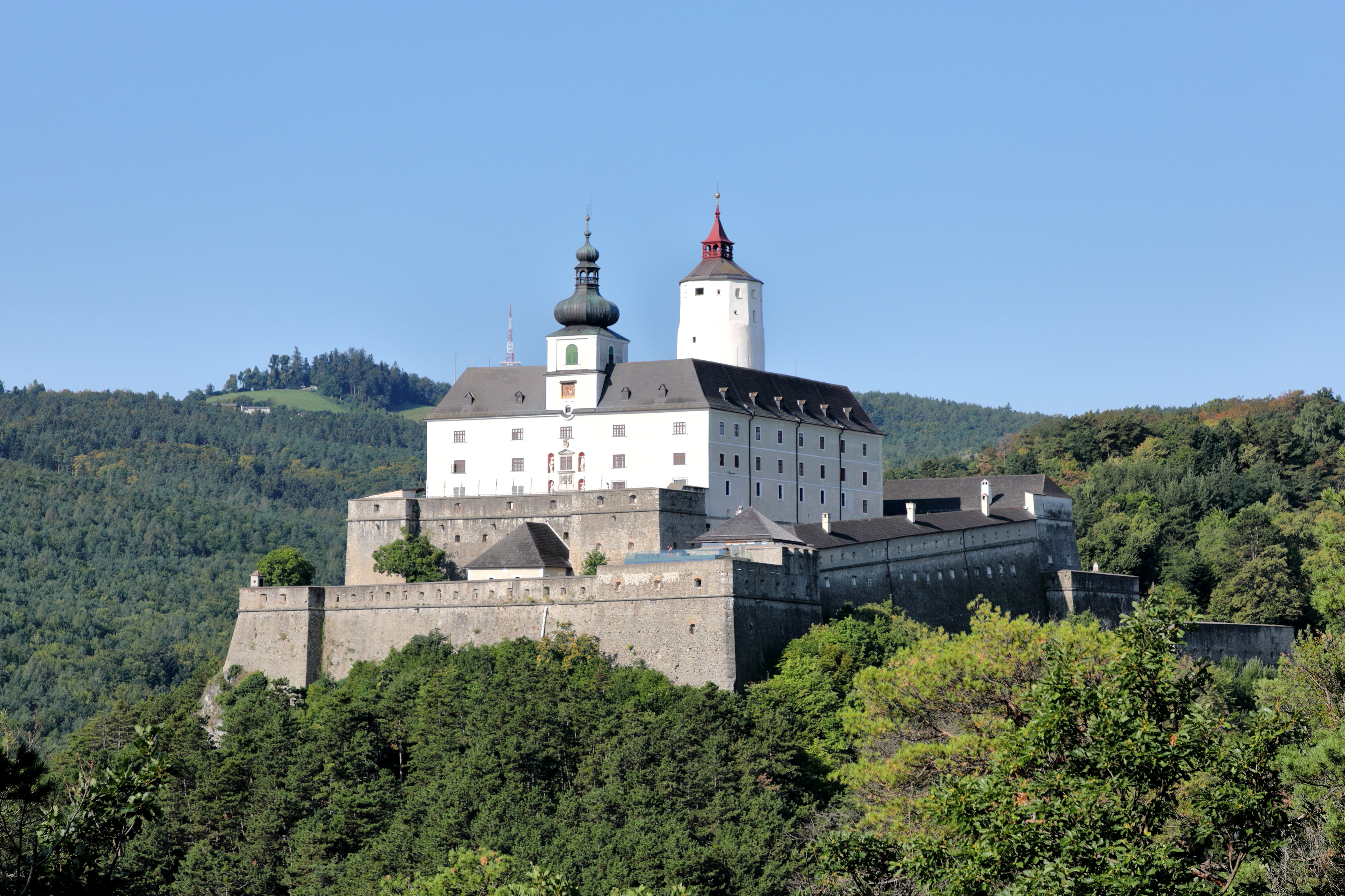 Nordostansicht der Burg Forchtenstein in Neustift an der Rosalia, ein Ortsteil der burgenländischen Gemeinde Forchtenstein.Die Burg befindet sich auf einem steilen Dolomitfelsen am Ostabhang des Rosaliengebirges und sicherte die Straßenverbindung Wr. Neustadt - Ödenburg (heutiges Sopron). Sie wurde ab dem 14. Jahrhundert von den Grafen von Mattersdorf errichtet. Nachdem die Burg 1626 in den Besitz der Esterházy gelangte, wurde sie im 17. Jahrhundert umfangreich um- und ausgebaut.